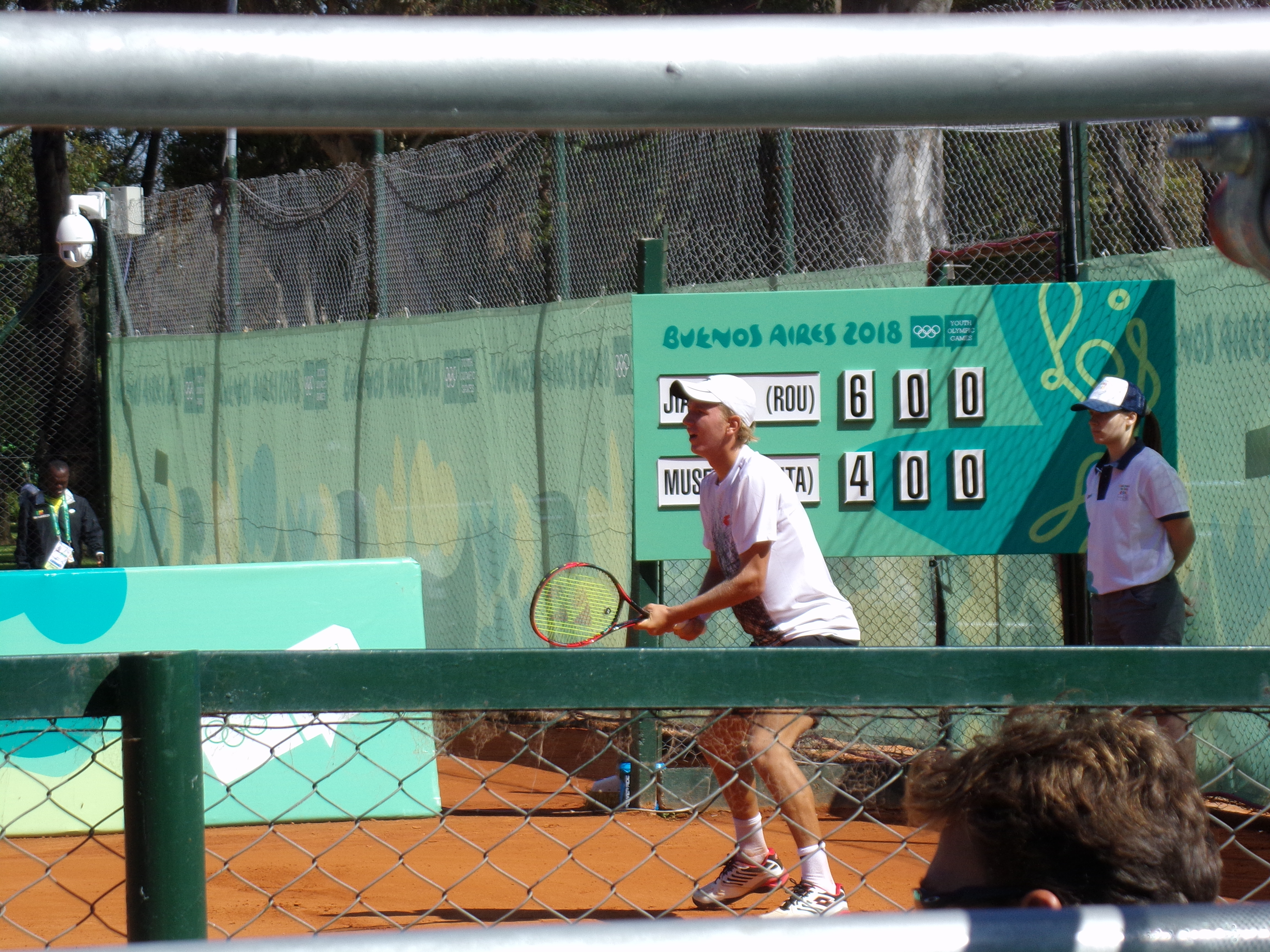 Filip Cristian Jianu